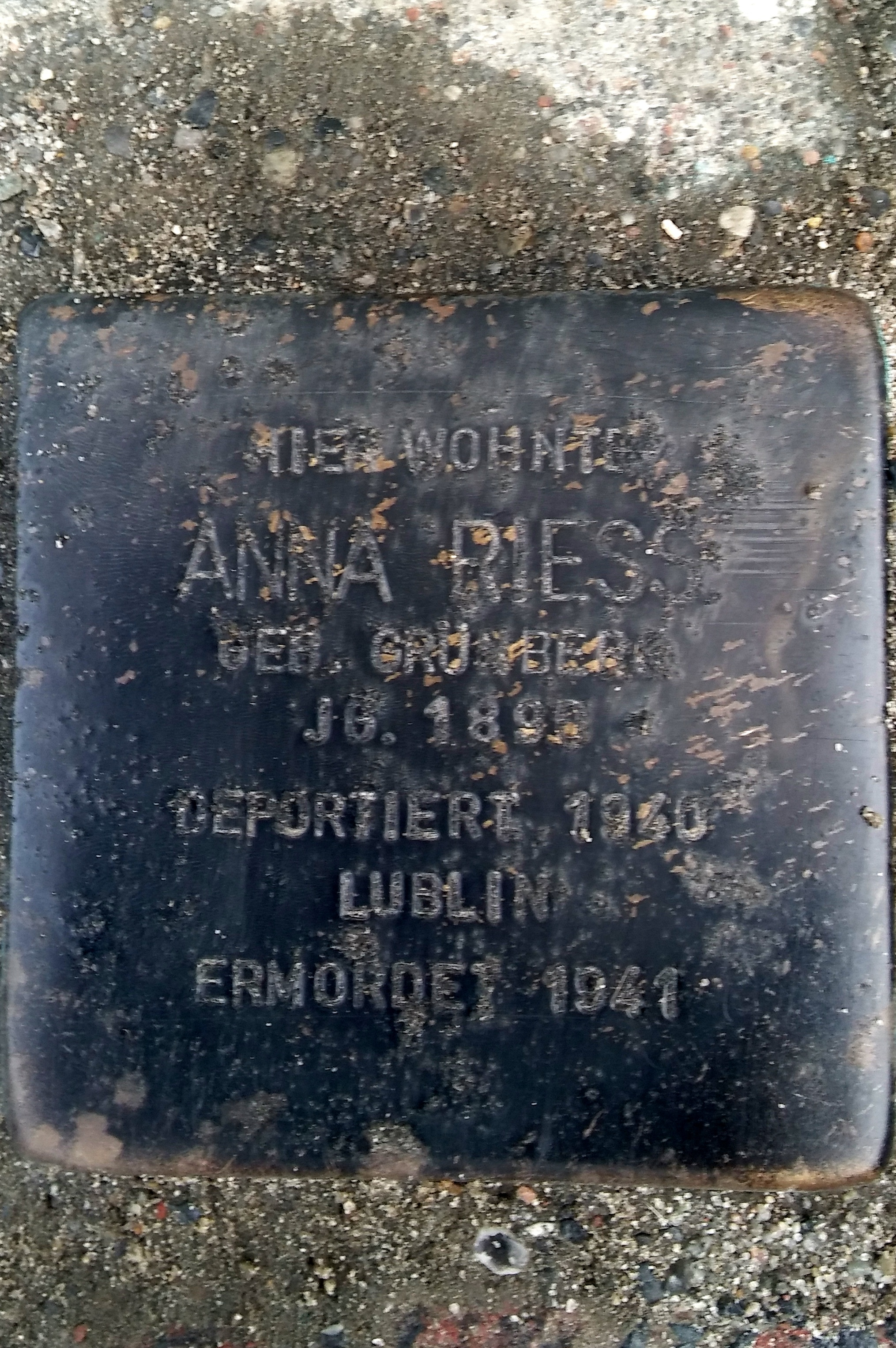 Stralsund, Tribseer Damm 54, Stolperstein Anna Riess